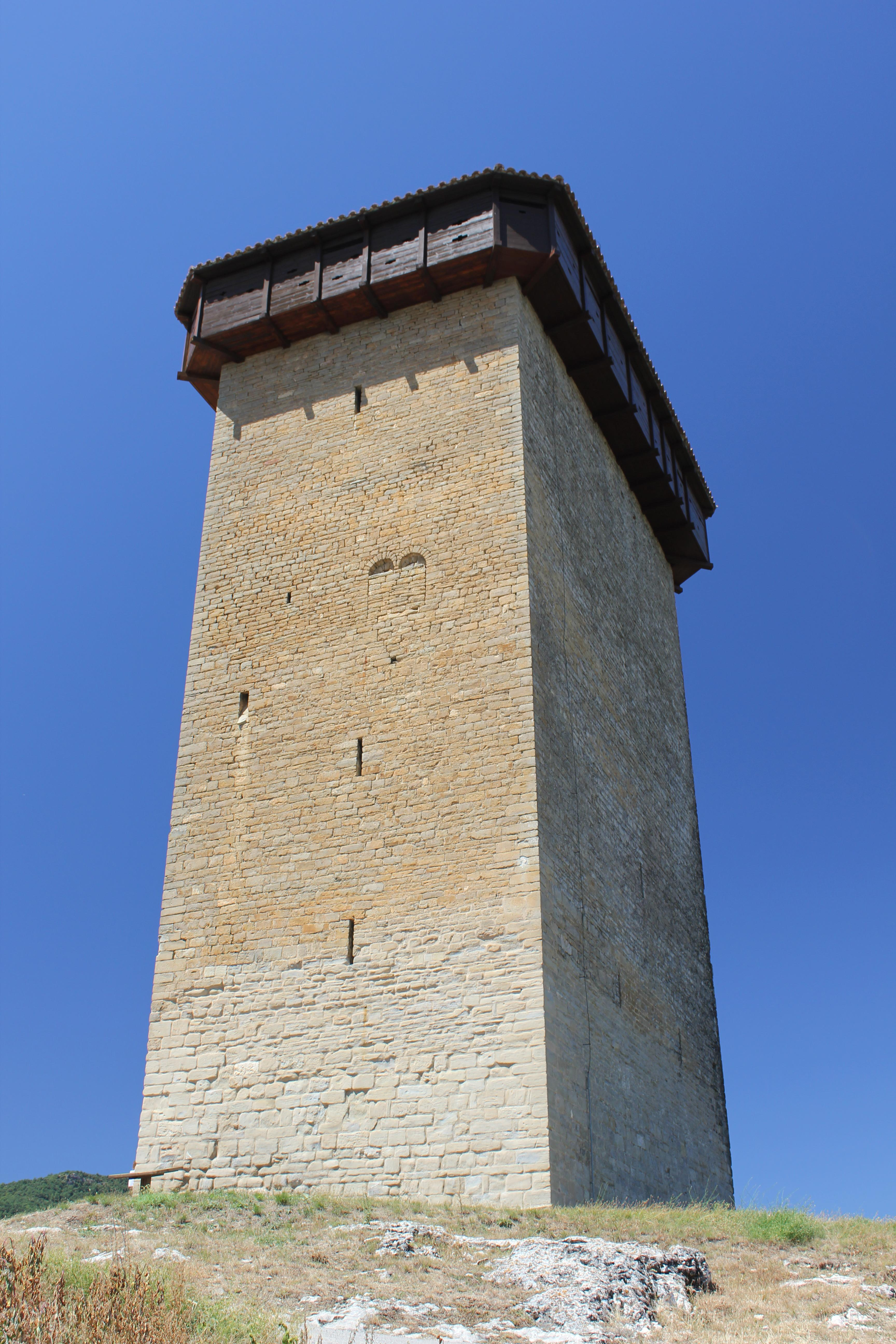 Aragonés: l'Abizanda